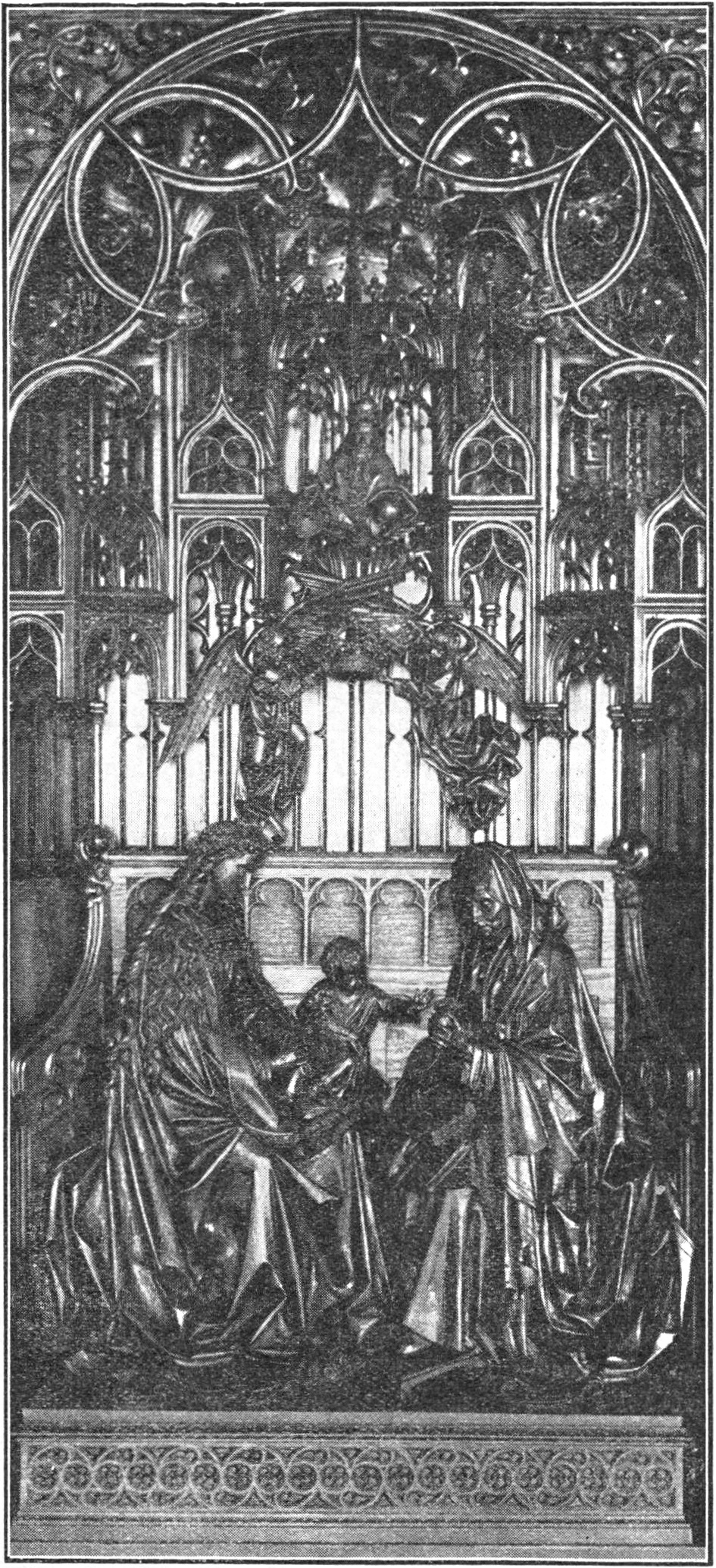 ZILVEREN PRIESTERJUBILé DEKEN J. VAN OPPEN TE VENLO. — Ter gelegenheid, van het Zilveren Priesterfeest van de H. E. Heer Deken J. van Oppen werd door het kerkbestuur van St. Martinus voor de kerk aangeboden de hier boven gereproduceerde zeer waardevolle St. Annagroep van de Gochsche beeldhouwer Langenberg — dezelfde, die onder leiding van Kap. Windhausen het hoofdaltaar van de St. Martinus ontwierp — welk artistiek werk men het geluk had te Leiden te kunnen koopen. Afkomstig uit Mooi Limburg, jrg. 8, nr. 28 (zaterdag 21 april 1934), [p. 3].